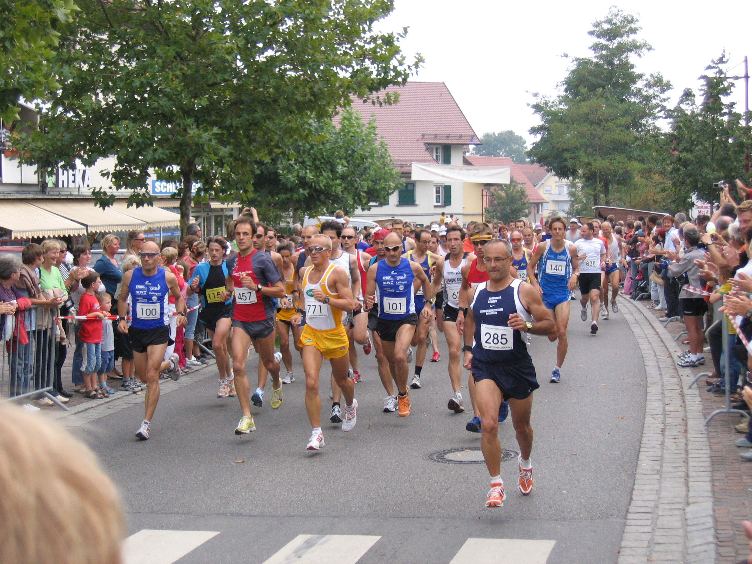 Start des Bodensee-Marathons